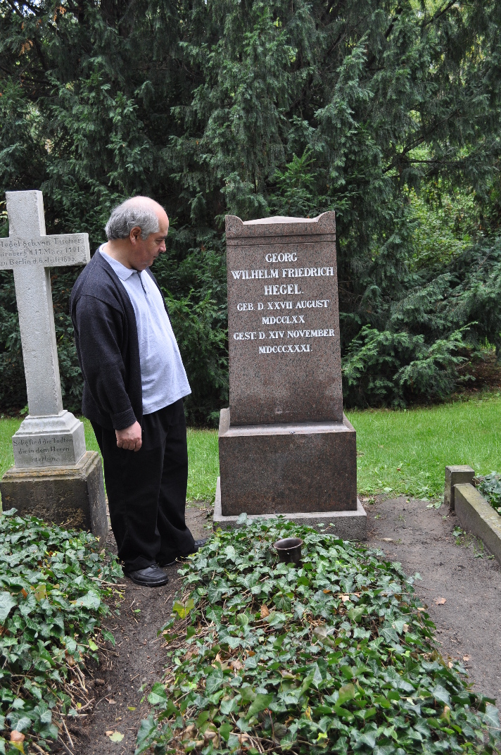 Carlos Pérez Soto am Grab Georg Wilhelm Friedrich Hegels in Berlin